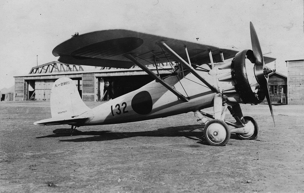 91式戦闘機